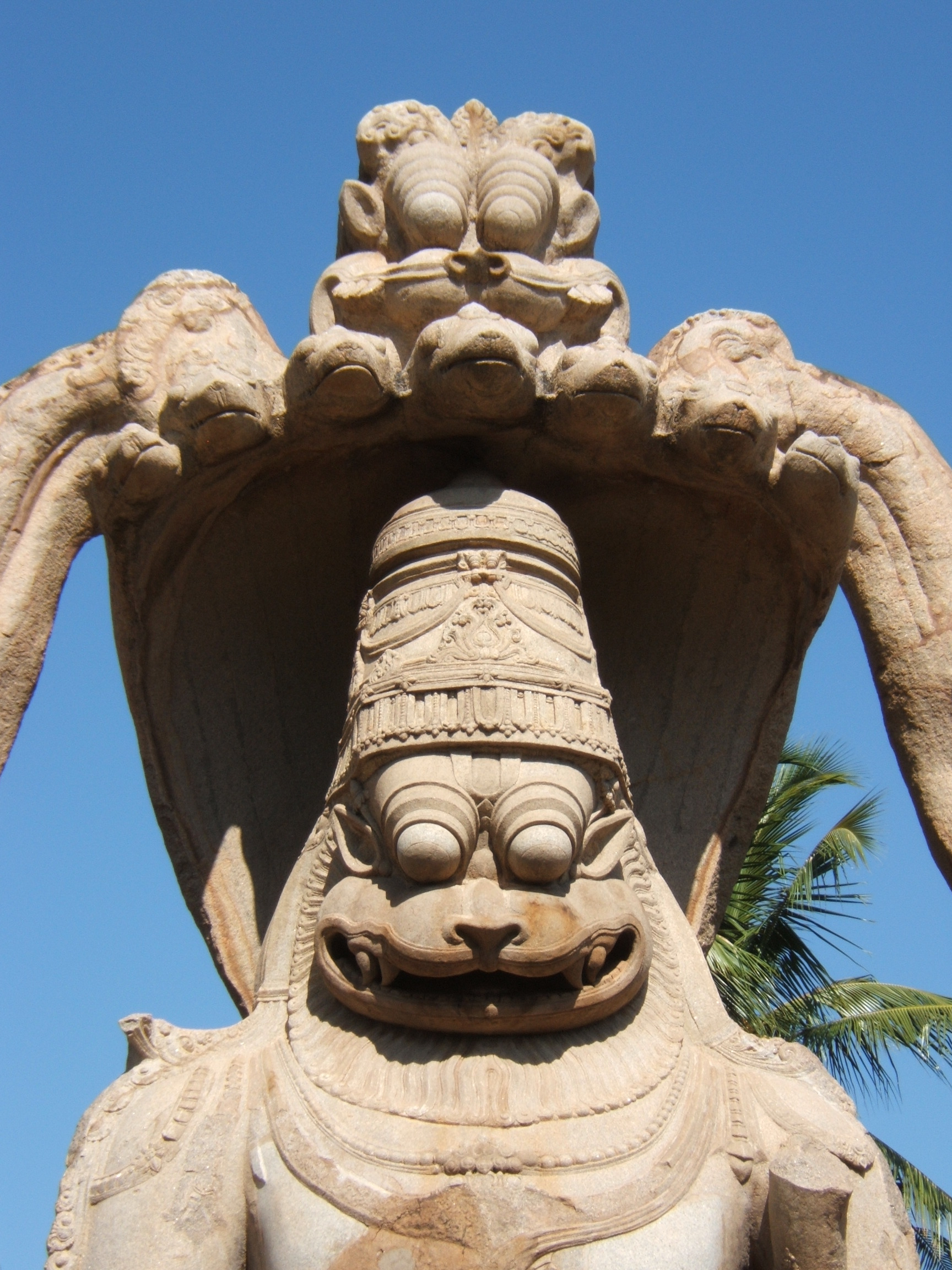 Yoga Narasimha_Hampi